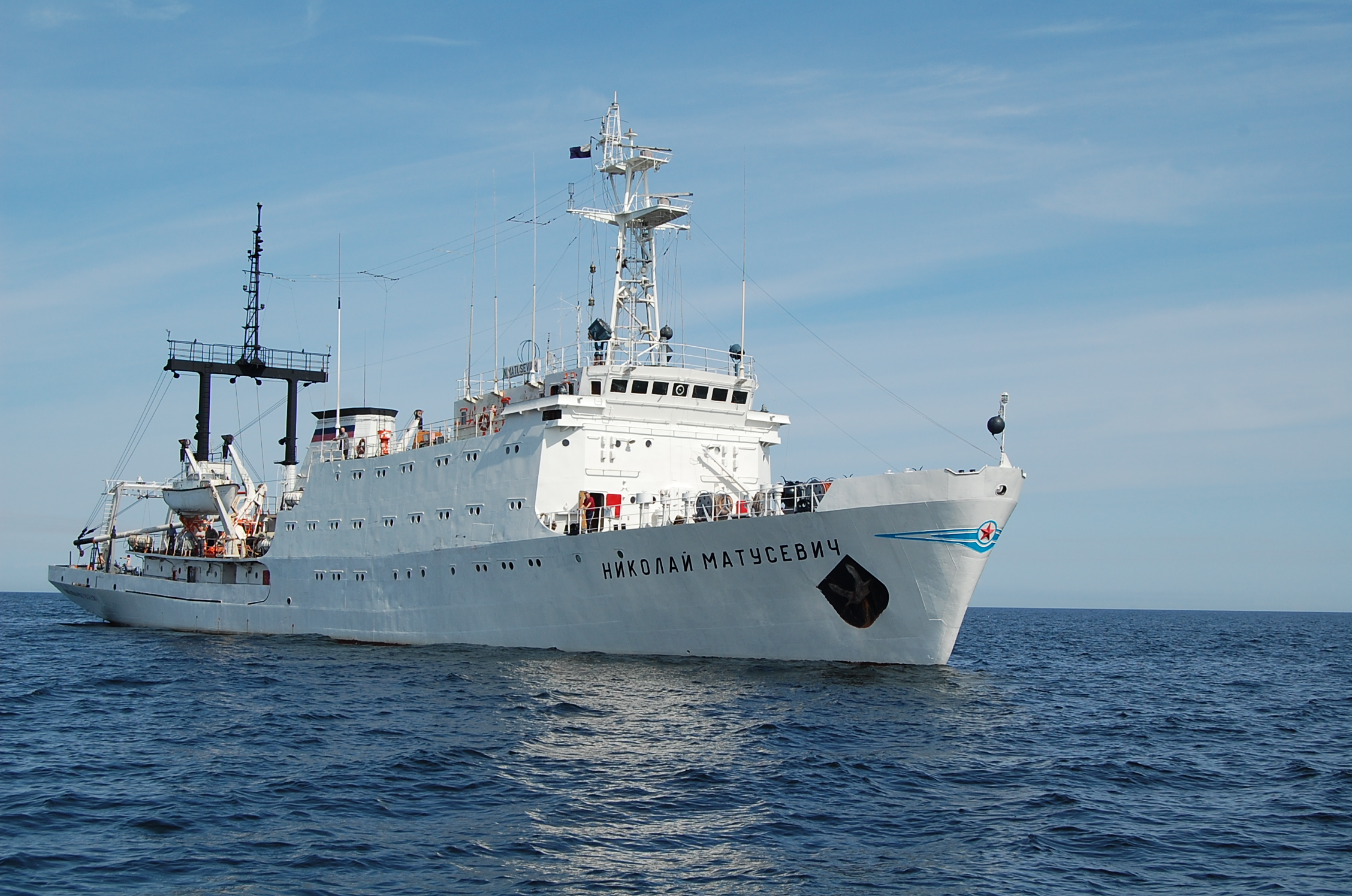 Балтийское море, Финский залив 2009 г.